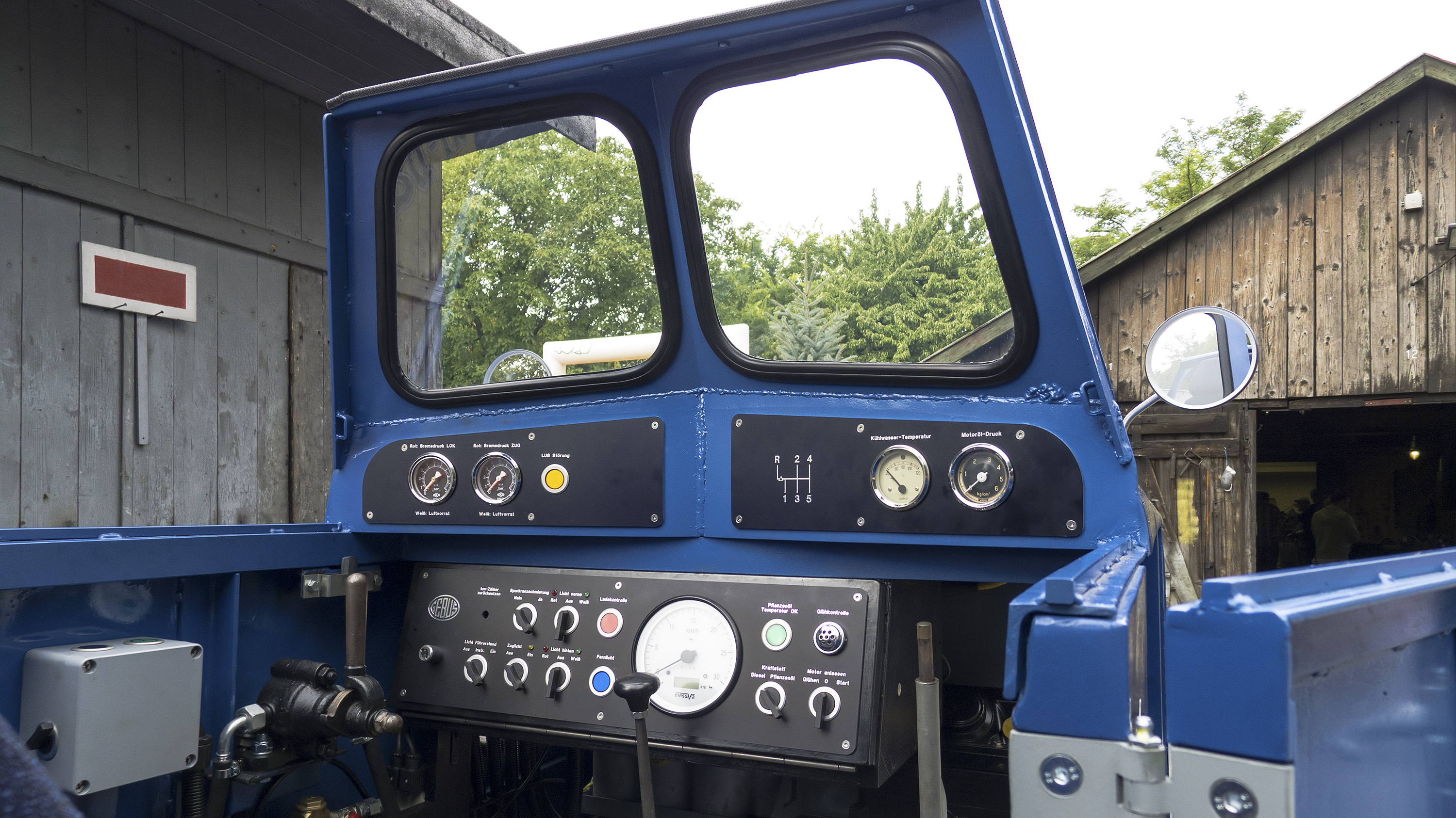 Liliputbahn im Wiener Prater in Wien 2, Diesellok D1, Führerstand